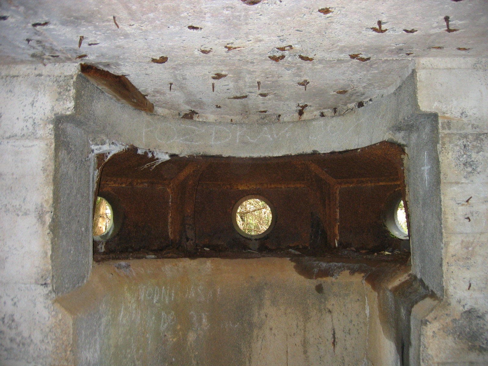 Notranjost strojničnega gnezda na vrhu slemenske utrdbe.